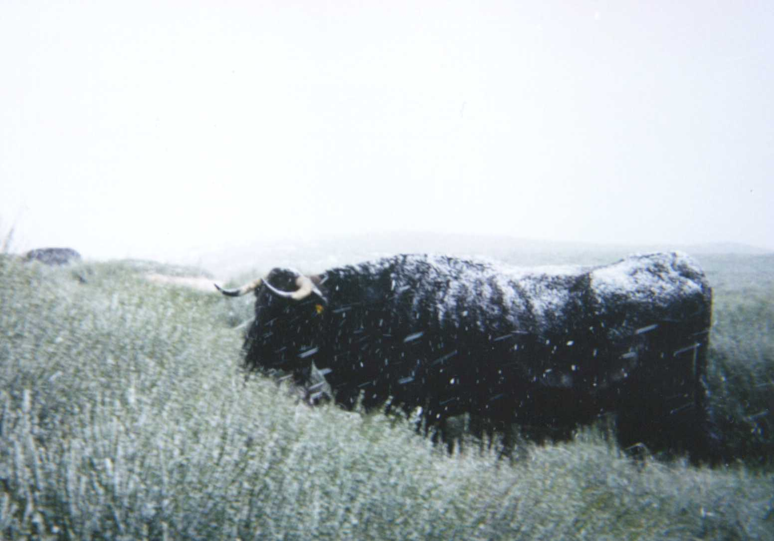 VACA DE RAZA AVILEÑA NEGRA IBERICA (SIERRA DE VILLAFRANCA, AVILA, ESPAÑA)